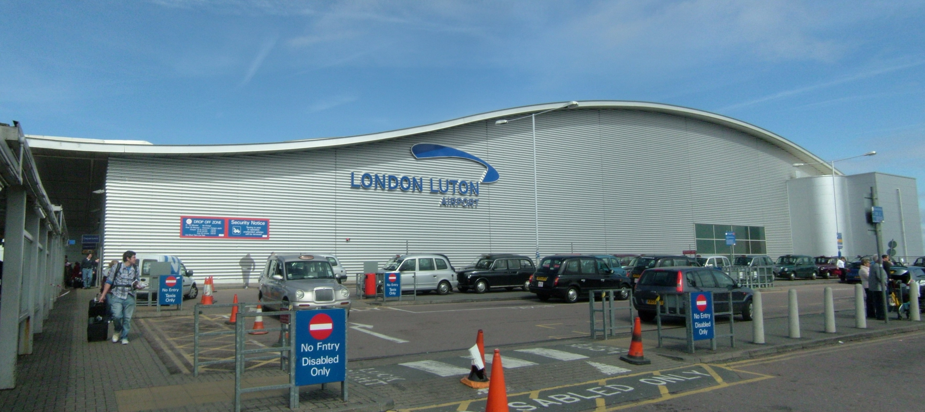 London Luton Airport's original entrance